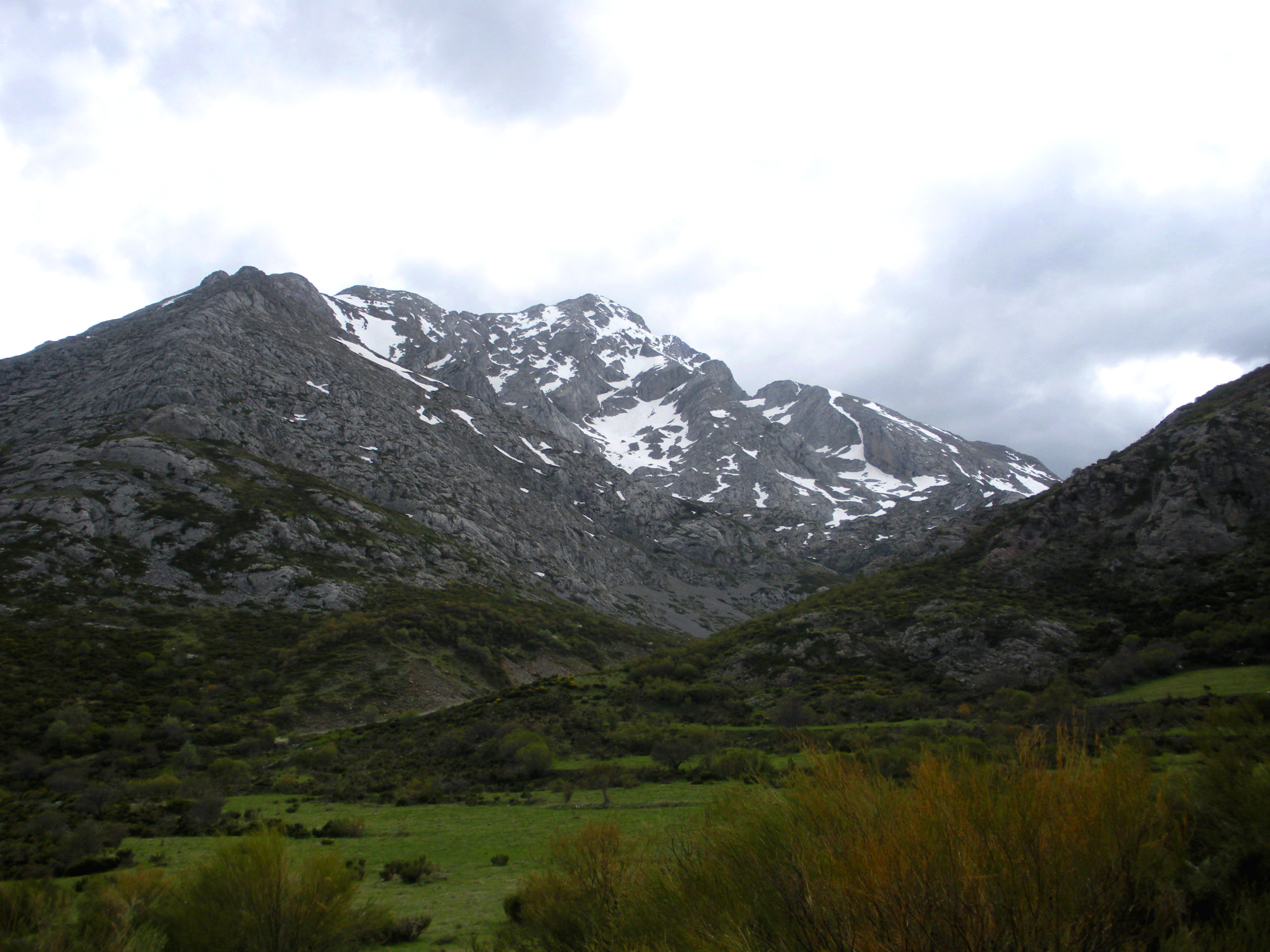 Vista Norte del Espigüete, Montaña Palentina, España.